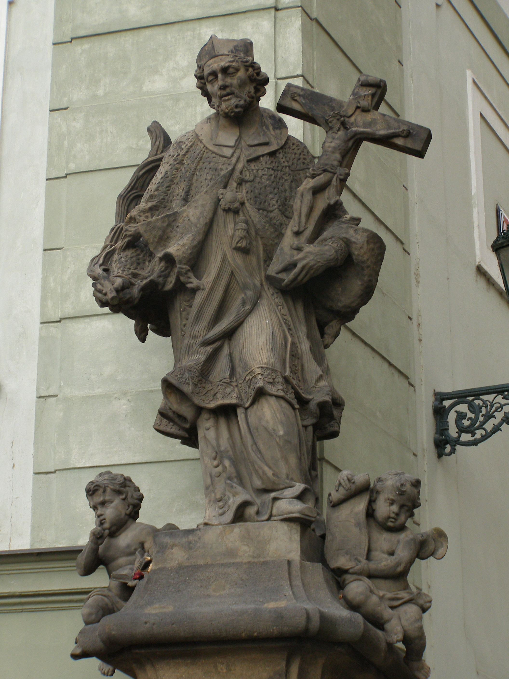 Socha sv. Jana Nepomuckého, Praha 1, Radnické schody